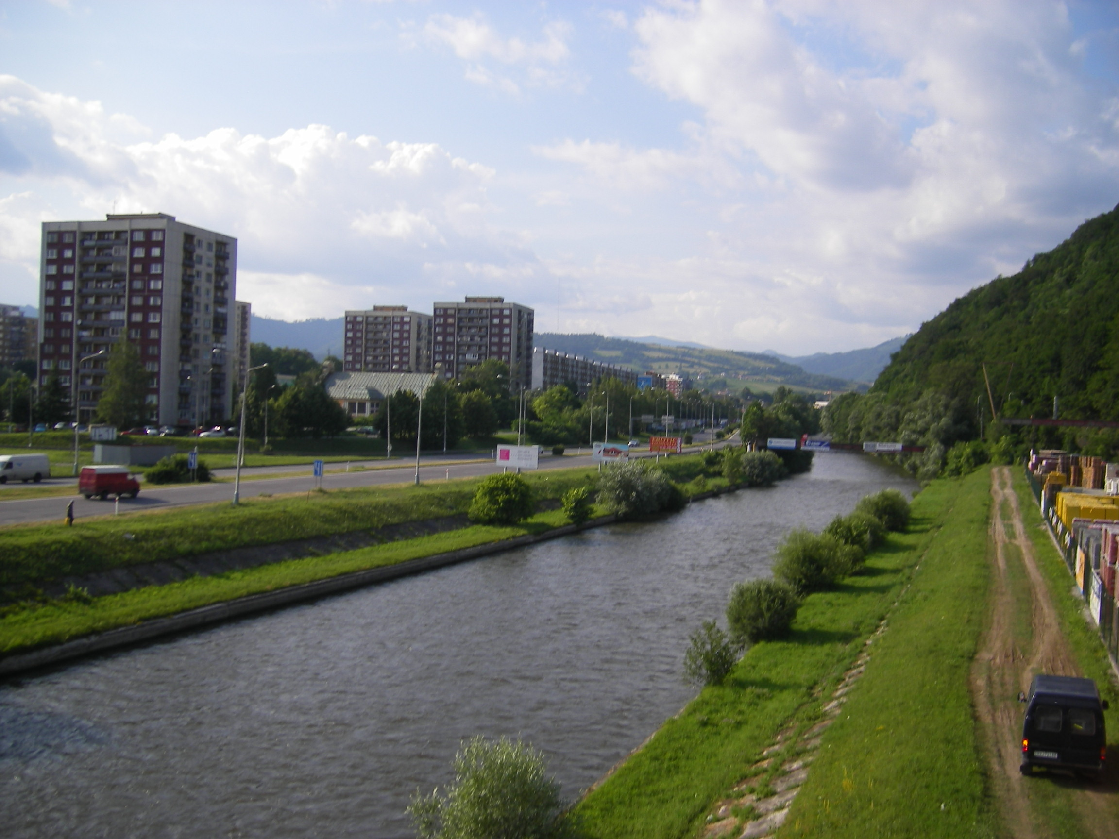 Radvaň, Banská Bystrica